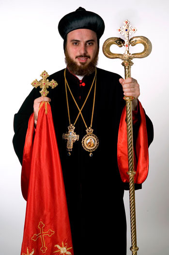 Mor Philoxenos Matthias Nayis